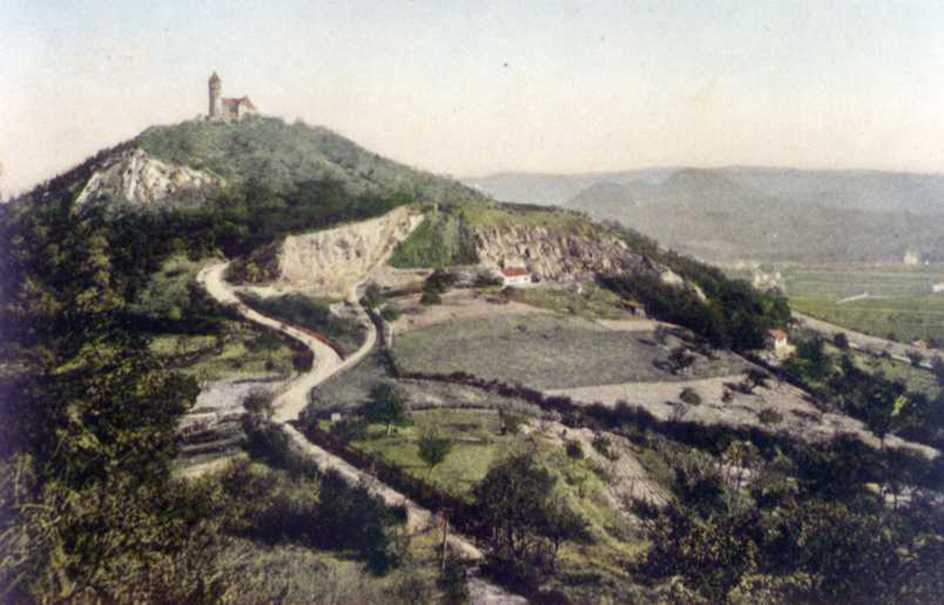 Blick auf den Schlossberg bei Most (Brüx) in Tschechien